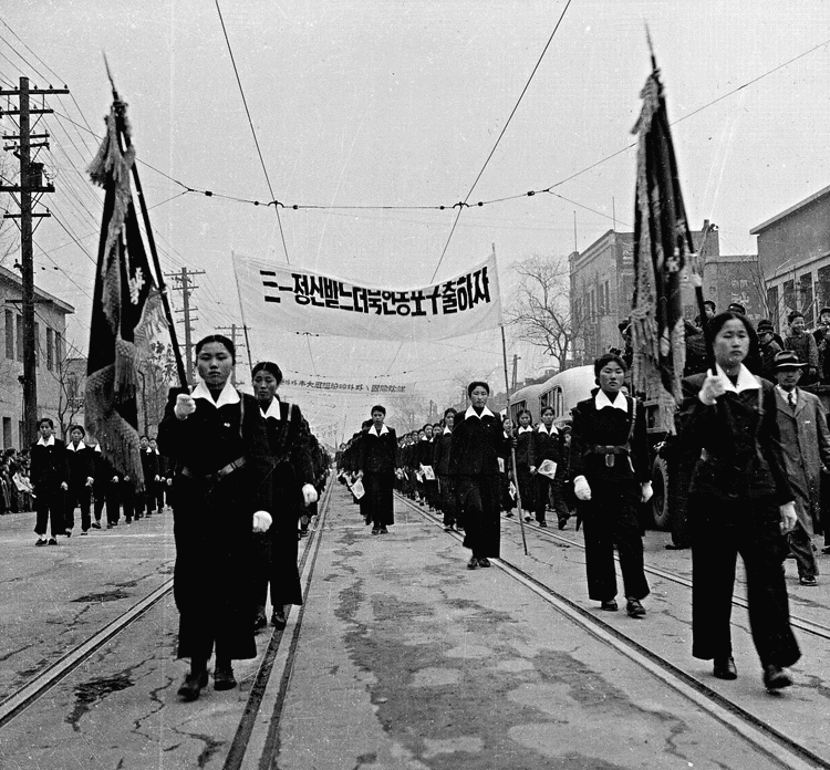 촬영일 : 1954년 03월 01일 촬영장소 : 대한민국 서울 서울 참석자 : 미상 관련내용 : 제35회 3·1절 시가행렬. 각종 구호가 적힌 플래카드가 눈길을 끈다.